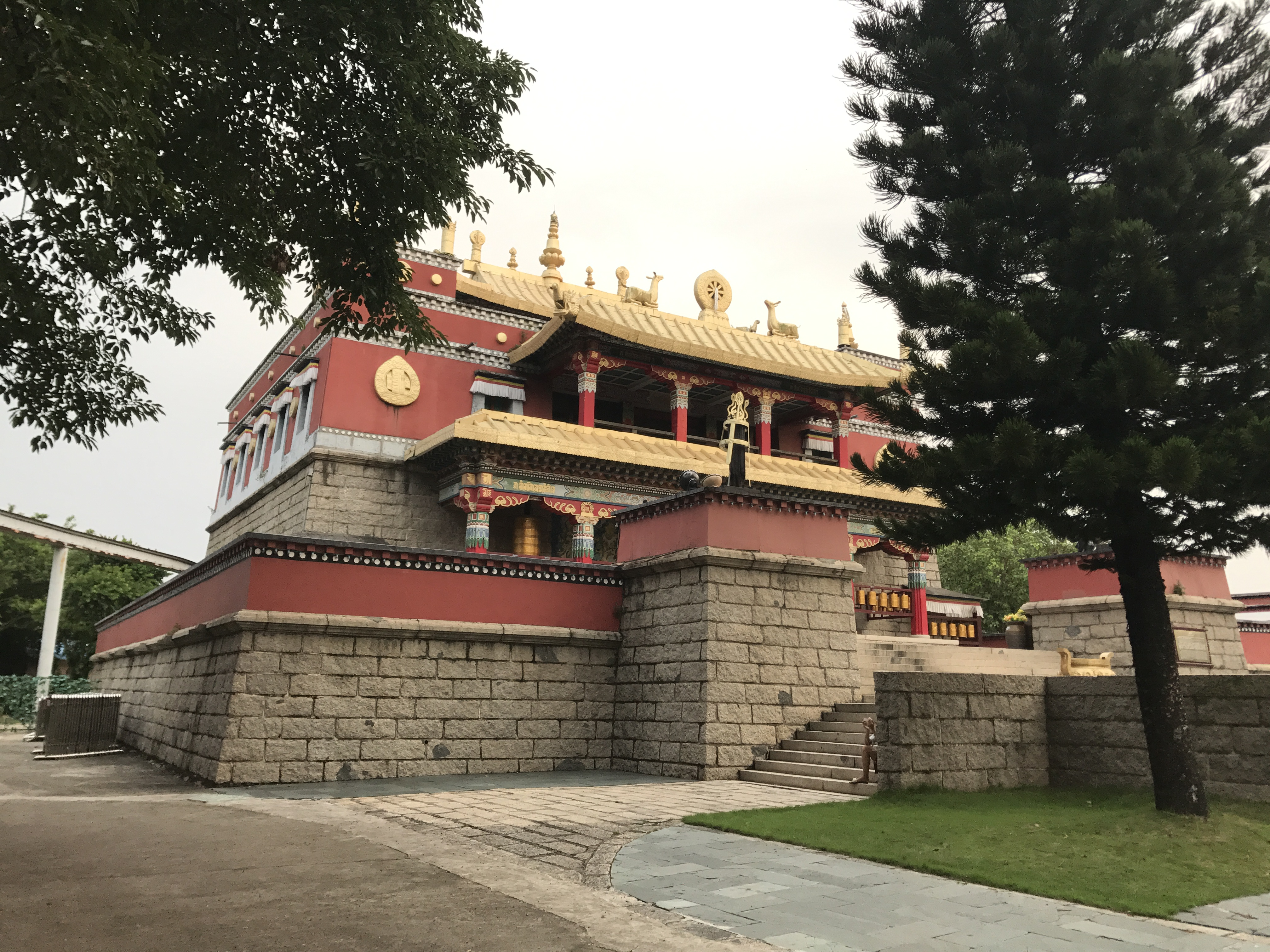 錦繍中華民俗村